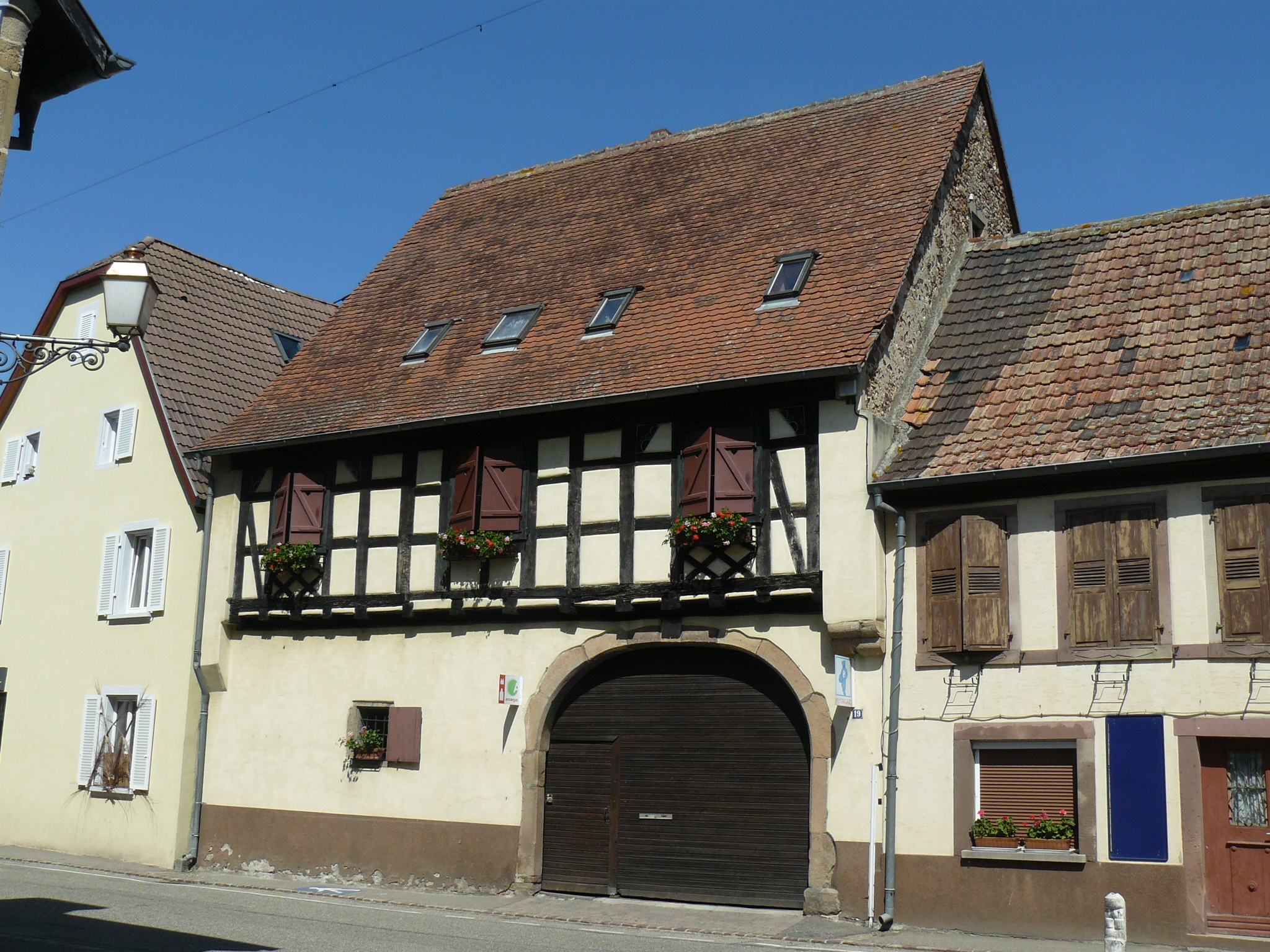 Maisons à colombages près de la place de l'église